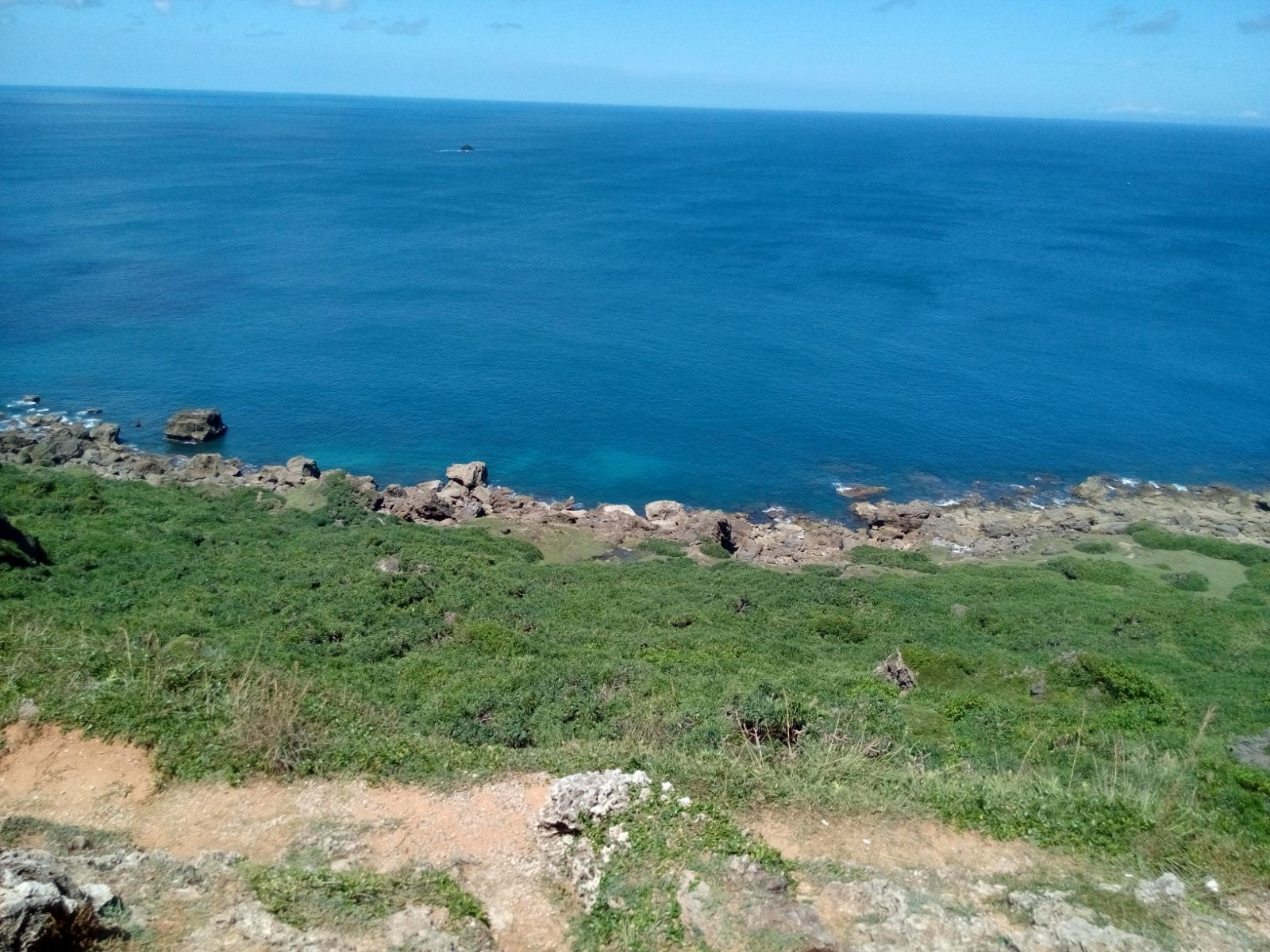 Lautan Pasifik